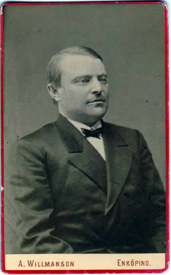 Foto av Dr Ernst Westerlund, stadsläkare i Enköping